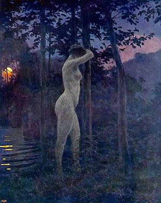 Ilustracja Henryka Weyssenhoffa do powieści Józefa "Soból i panna"